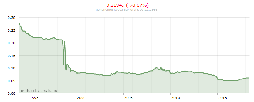 Изменение курса молдавского лея к доллару США с 1(2) декабря 1993 по 23 июня 2018